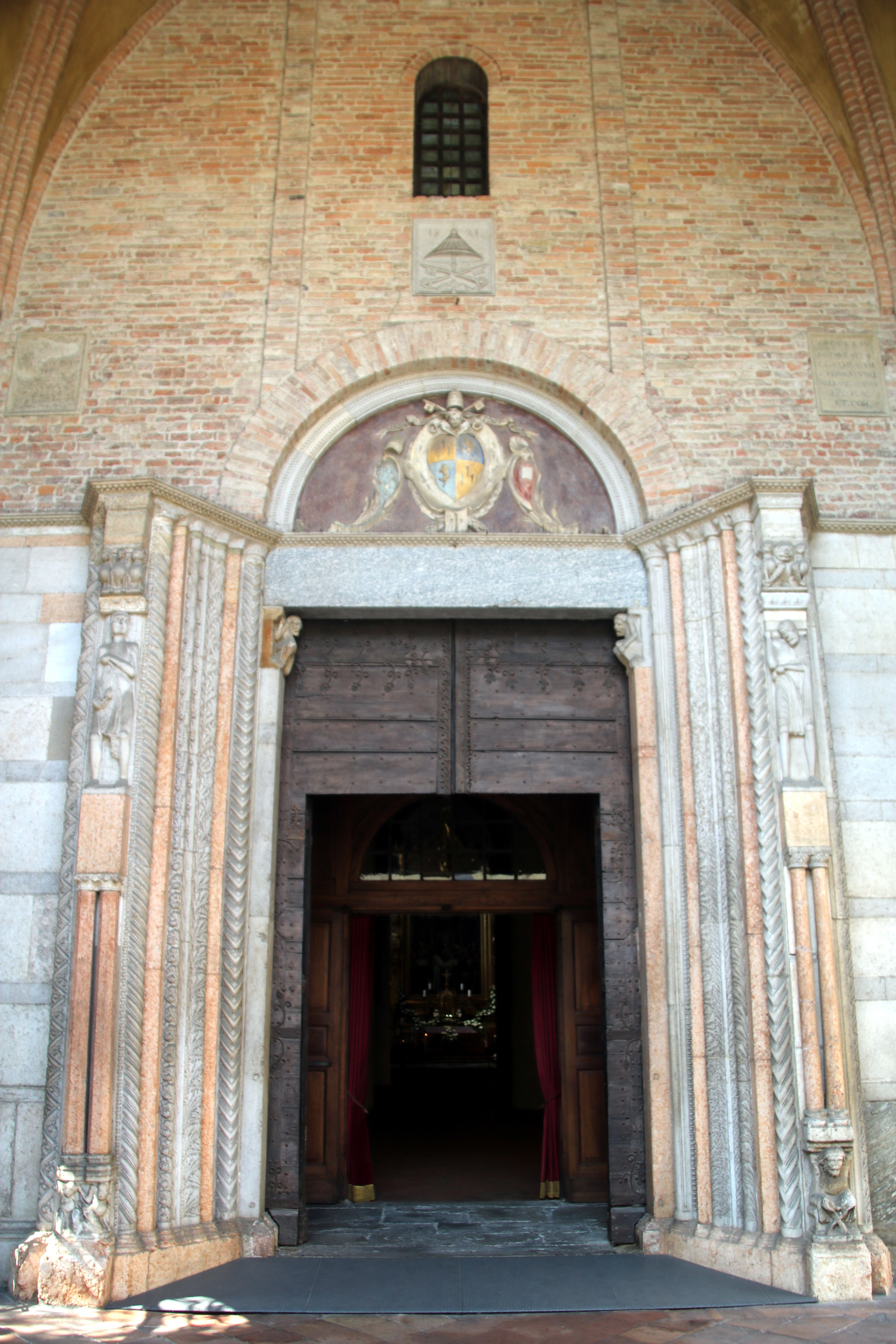 basilica di Sant'Antonino This is a photo of a monument which is part of cultural heritage of Italy.